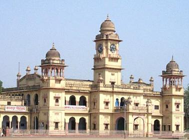 Kanpur Museum